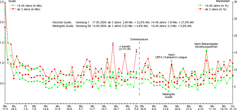 Quoten Anke Late Night (Original text: Verlauf Quoten und Marktanteil "Anke Late Night")